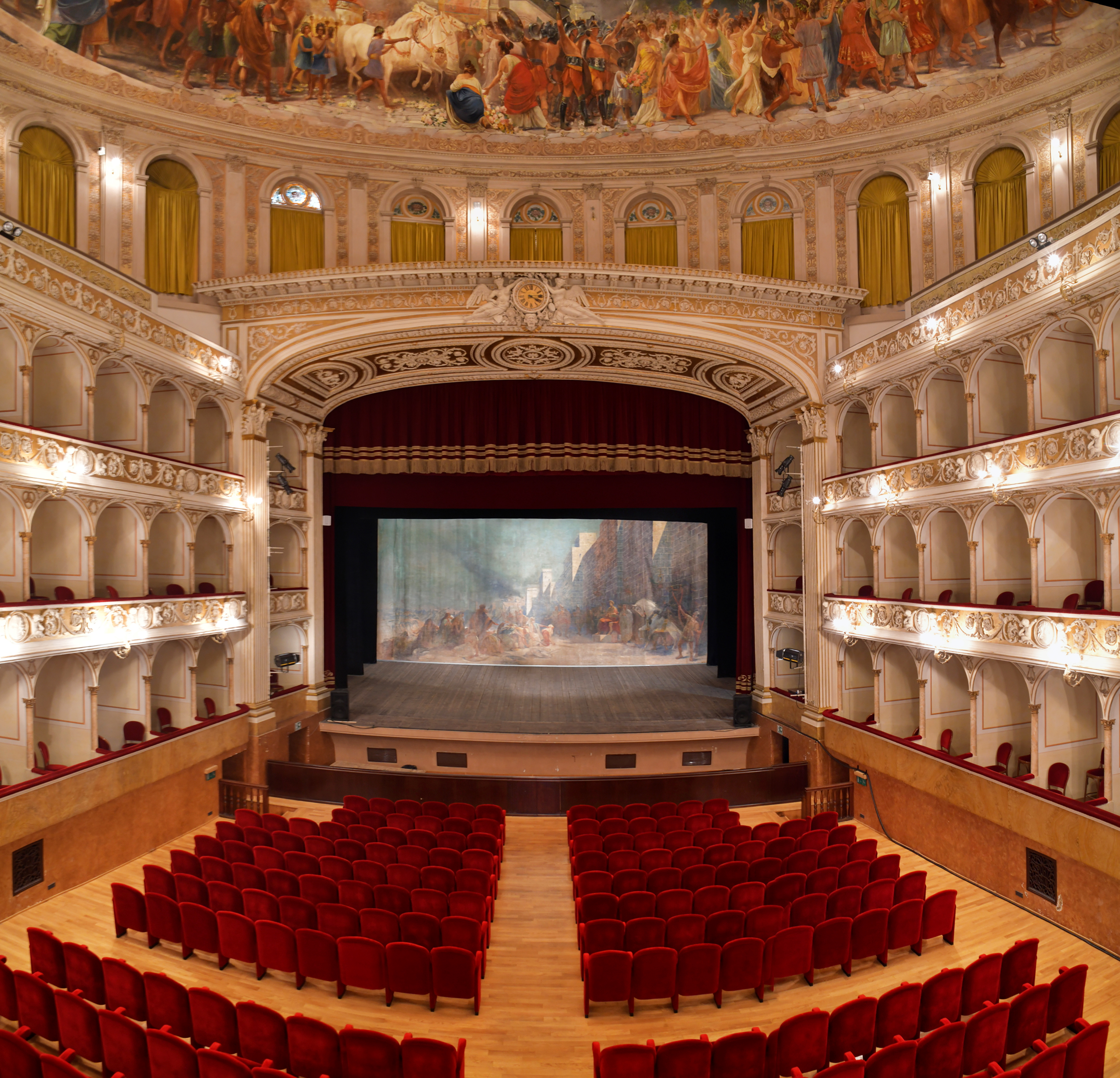 Teatro Flavio Vespasiano , Veduta This is a photo of a monument which is part of cultural heritage of Italy. Questa è una foto di un bene culturale italiano che partecipa al concorso Wiki Loves Valle del Primo Presepe 2019, gestito in coperazione con Wikimedia Italia. This is a photo of a monument which is part of cultural heritage of Italy. This monument participates in the contest Wiki Loves Valle del Primo Presepe 2019, operated in cooperation with Wikimedia Italia.